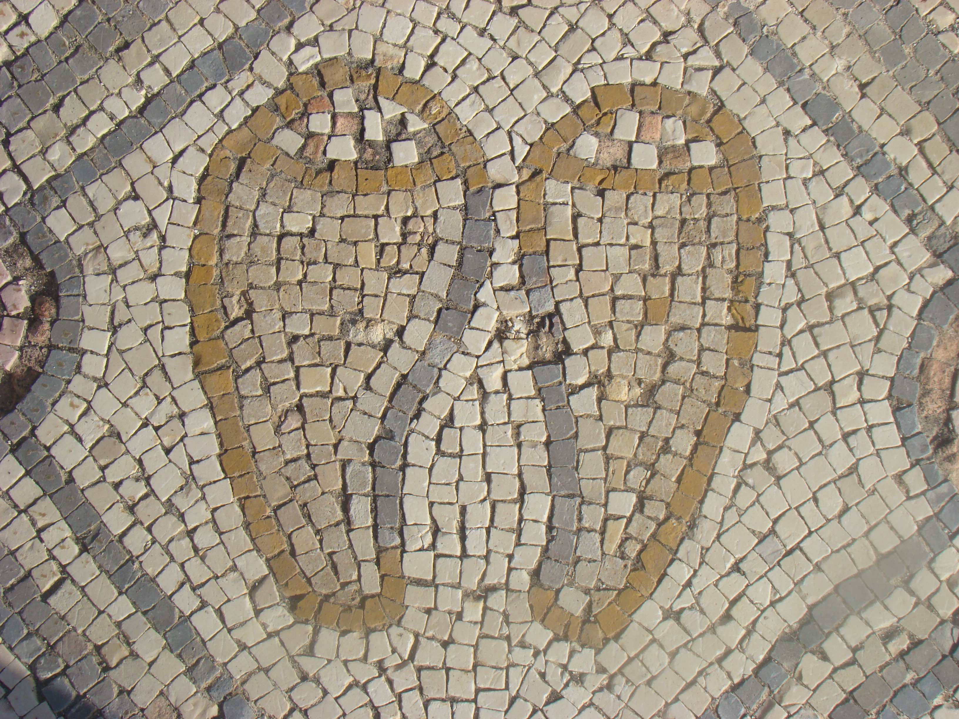 luffa, (sponge gourd)